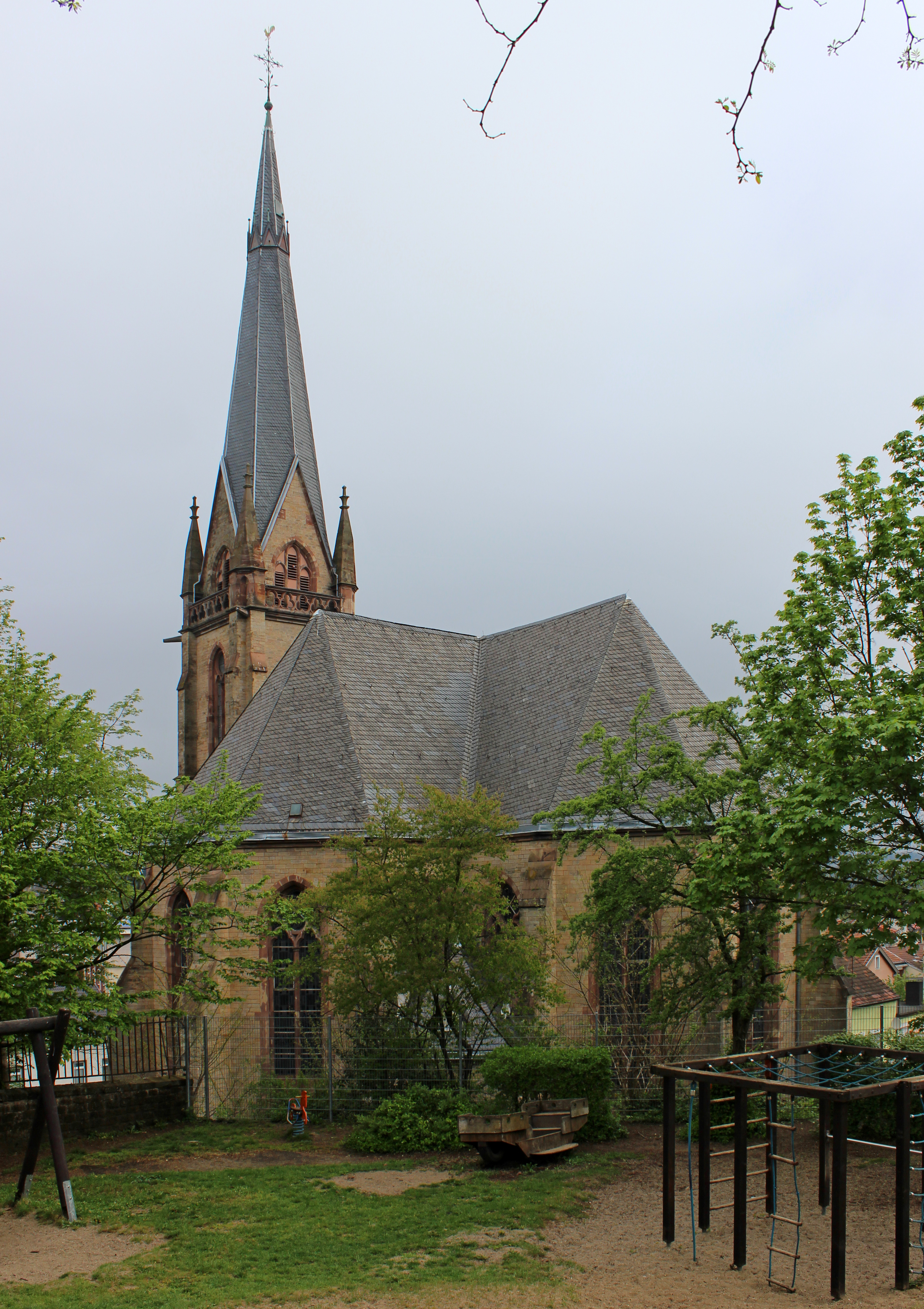 Die evangelische Christuskirche, Dudweiler, Stadt Saarbrücken, Saarland